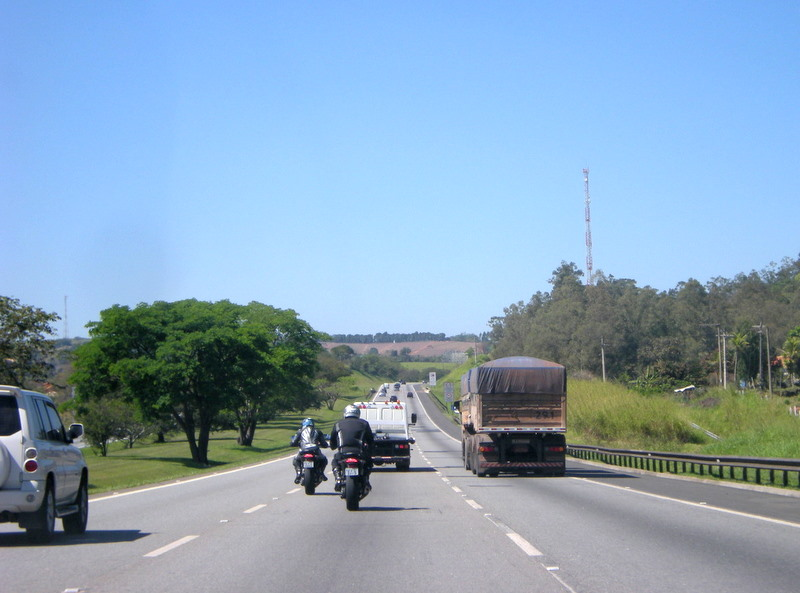 Foto tirada da Rodovia dos Bandeirantes, sentido Interior/Capital, em 22/04/2009.